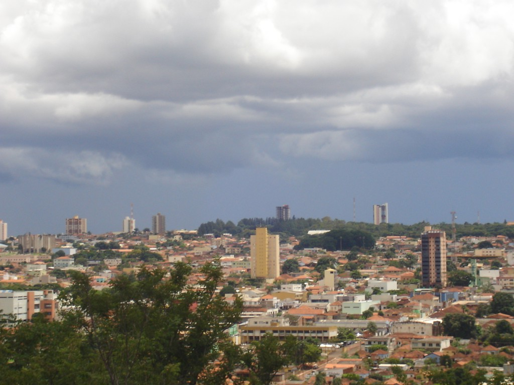 Cidade Abelha